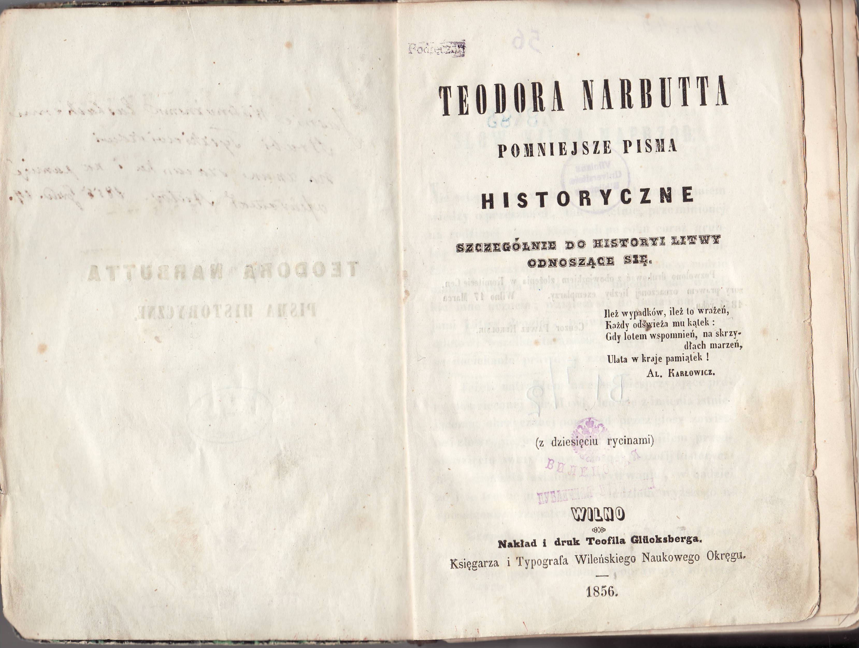 Teodora Narbutta Pomniejsze pisma historyczne szczególnie do historyi Litwy odnoszące się (z dziesięciu rycinami). Wilno: T. Glücksberg, 1856